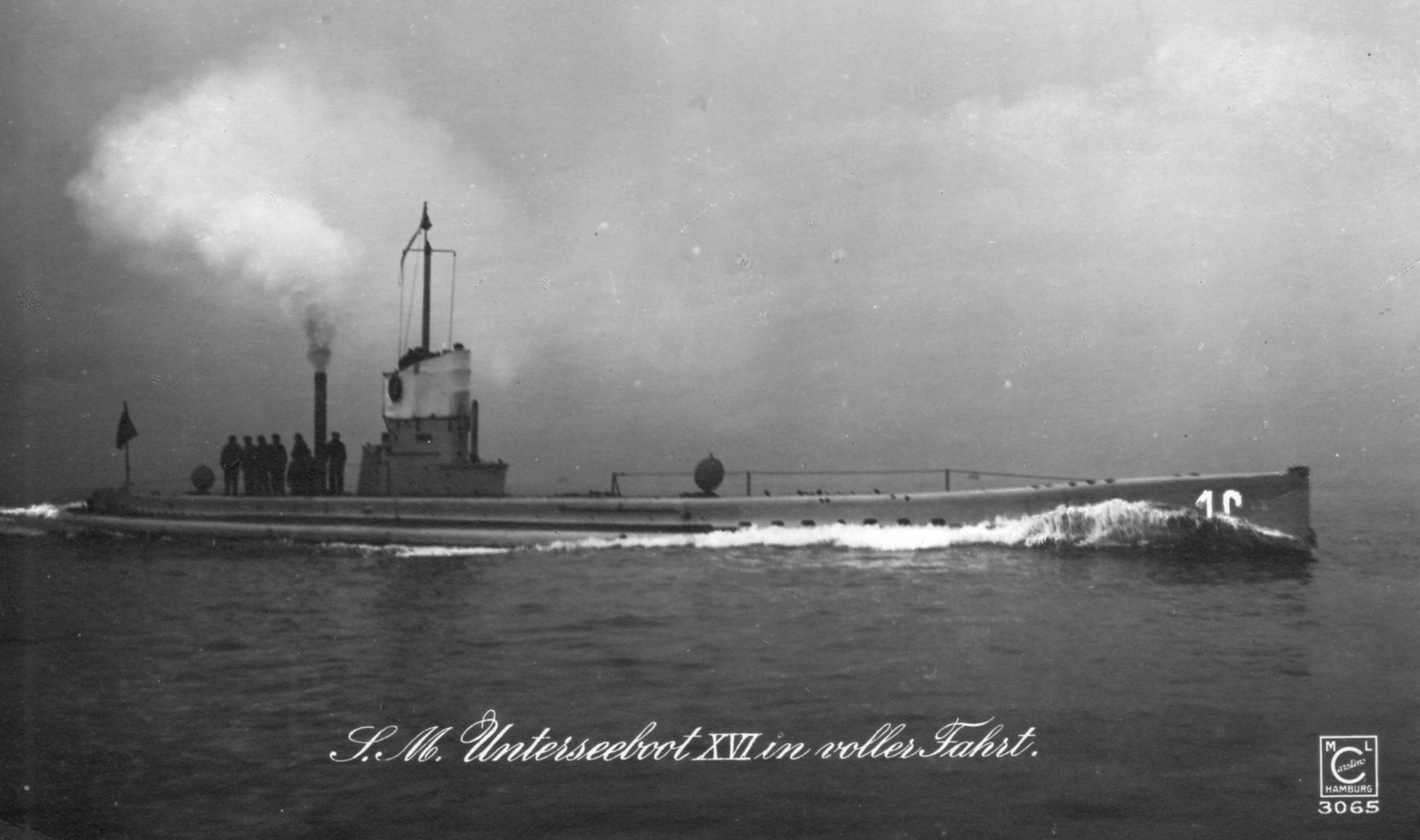 U 16. Feldpostkarte von Georg Cording, Nordseekriegsschauplatz vom 1. Juni 1915 an Mariechen Westerholt, Osternburg im Großherzogtum Oldenburg